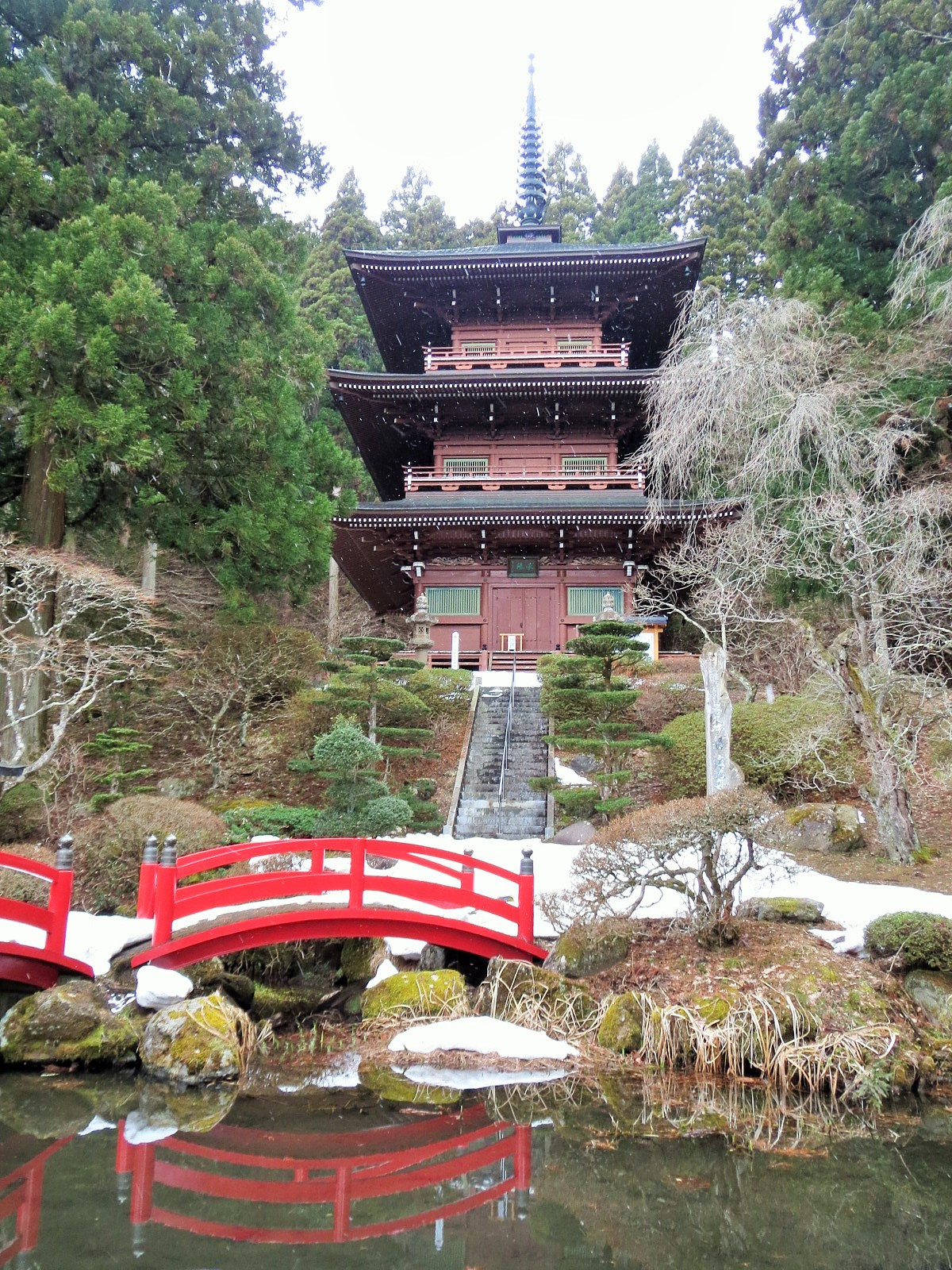 青森県の法光寺承陽塔 Canon IXY 3